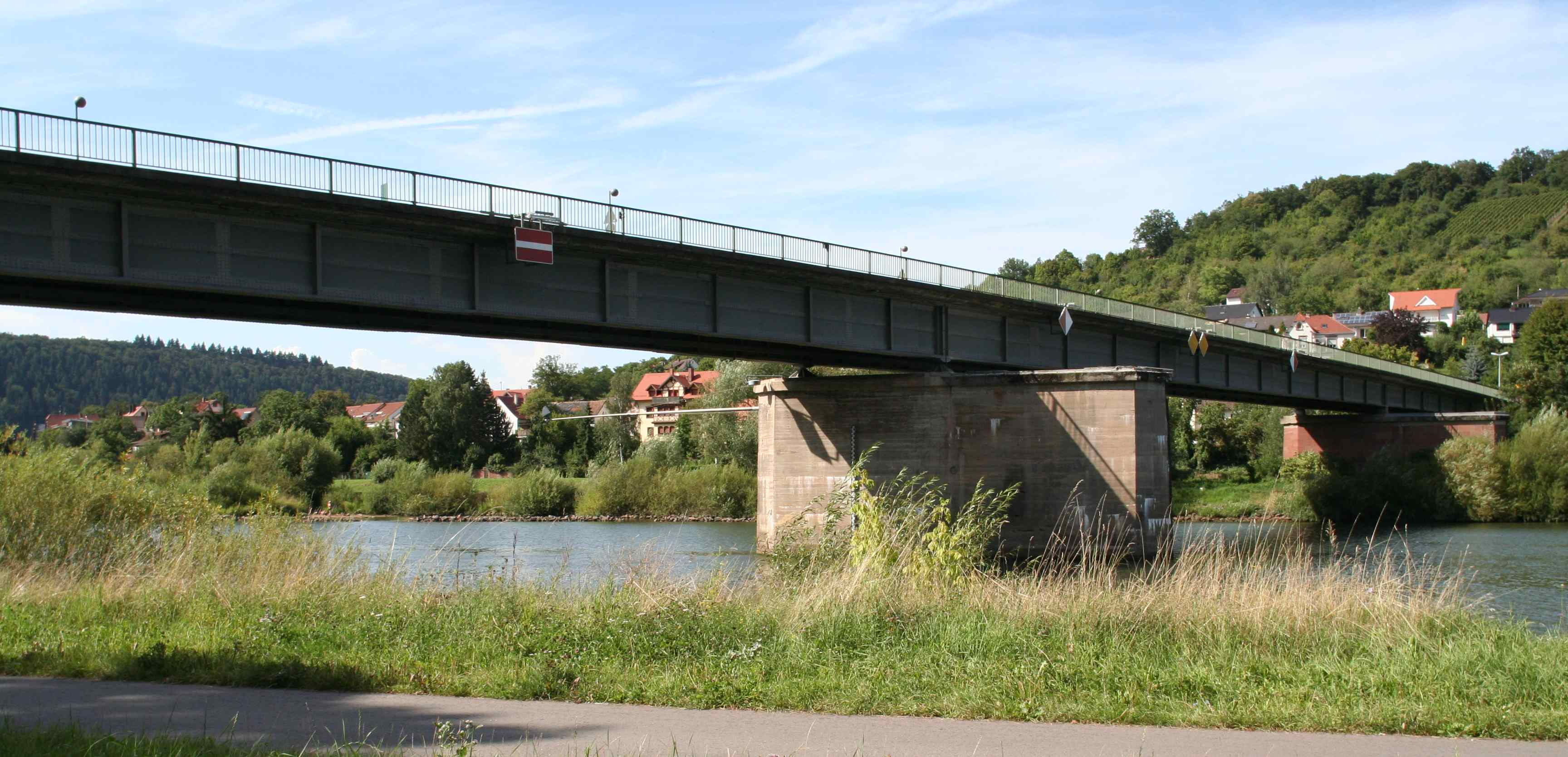 Mainbrücke Wertheim-Kreuzwertheim, Unterfranken